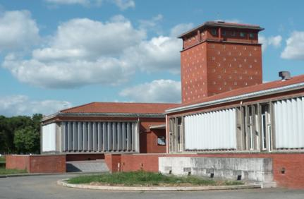 Vue ouest de la bibliothèque de l'ENVT à Toulouse.